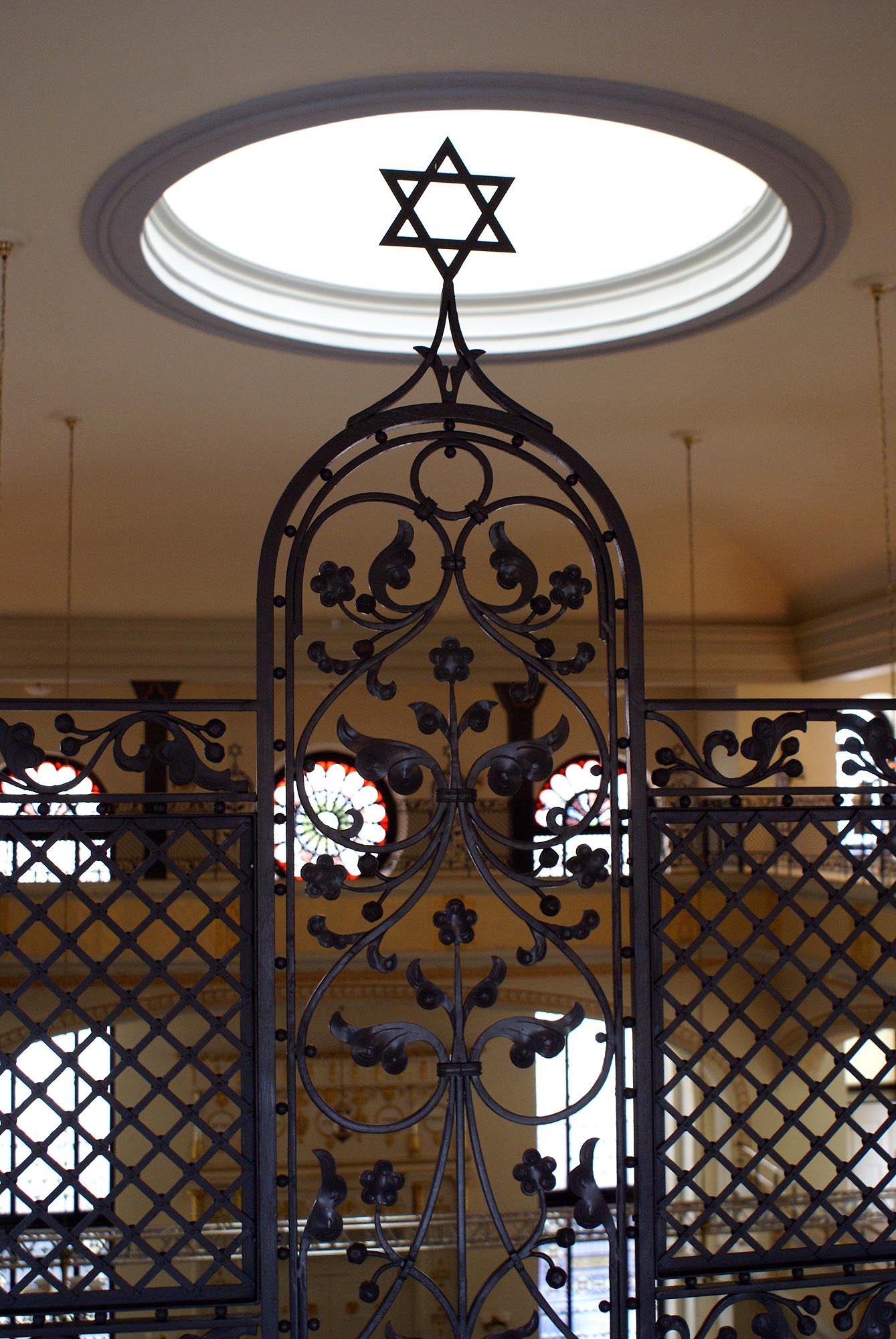 Wrocław, synagoga, 1820-1829